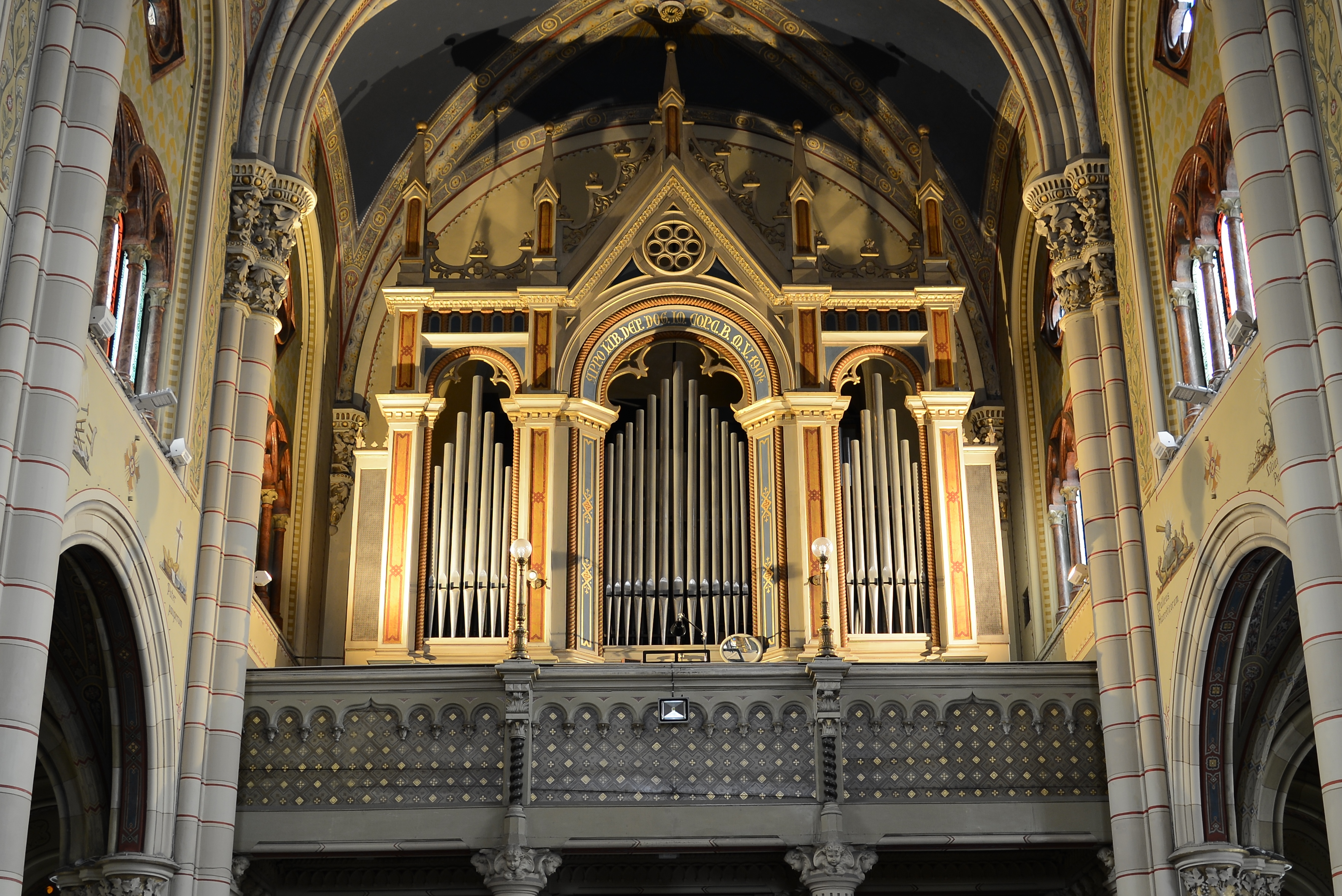 Facciata dell'organo Vegezzi-Bossi